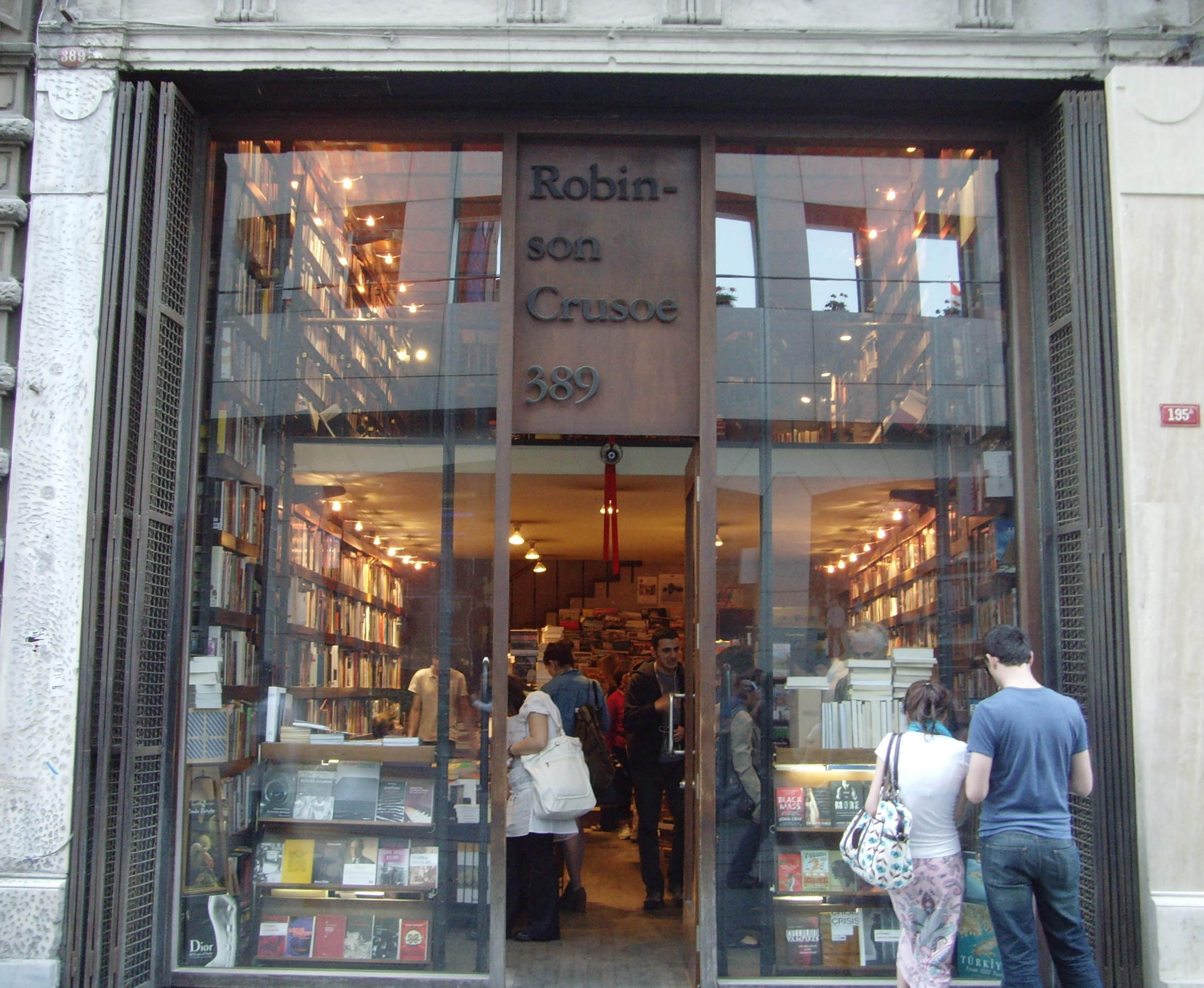 İstiklal Caddesi'ndeki Robinson Crusoe Kitapçısı / Robinson Crusoe Bookstore on İstiklal Avenue